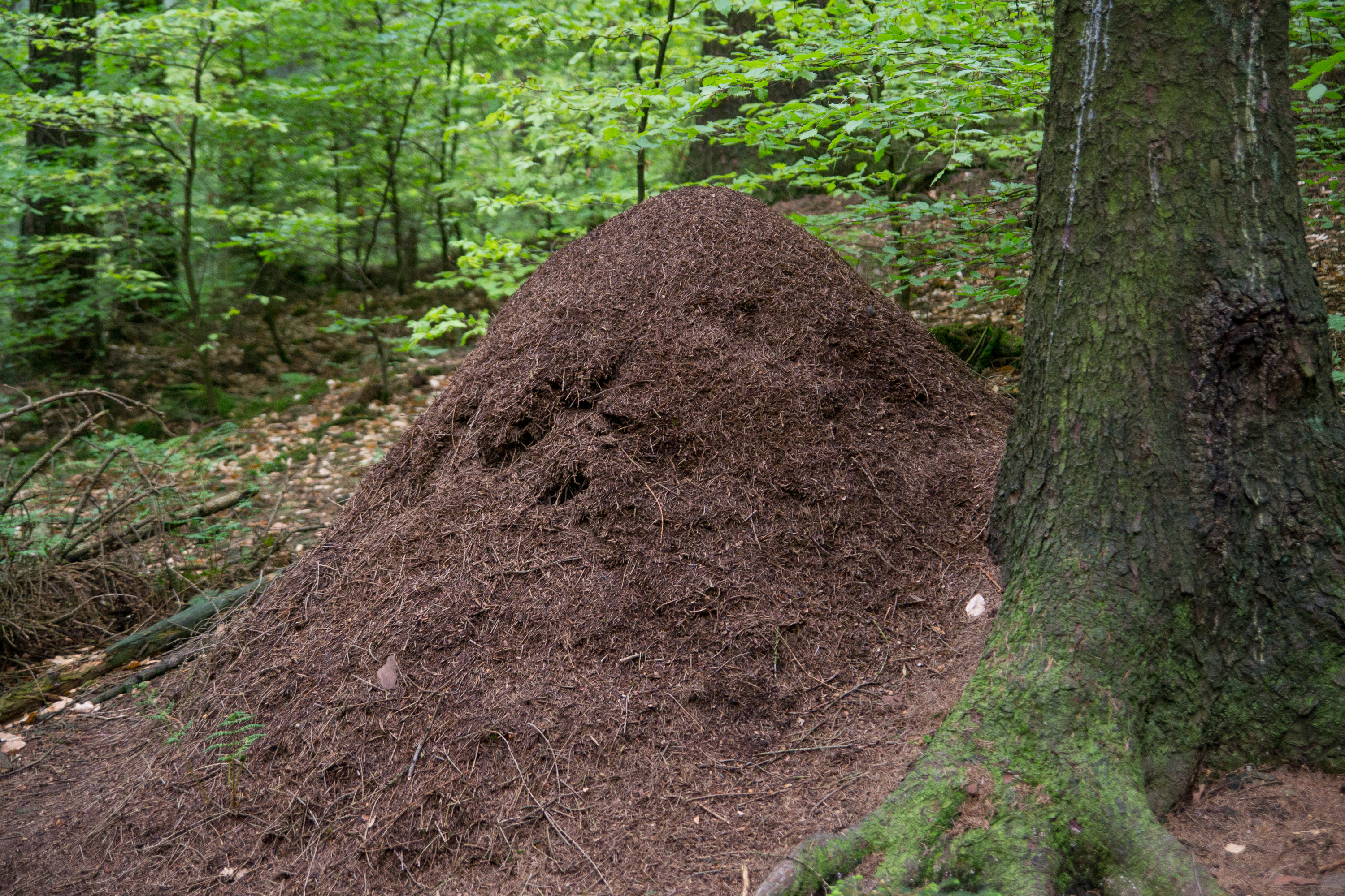 Naturschutzgebiet Egge-Nord, Kennung LIP-006K2, Gebiet Velmerstot, Rote Waldameisen